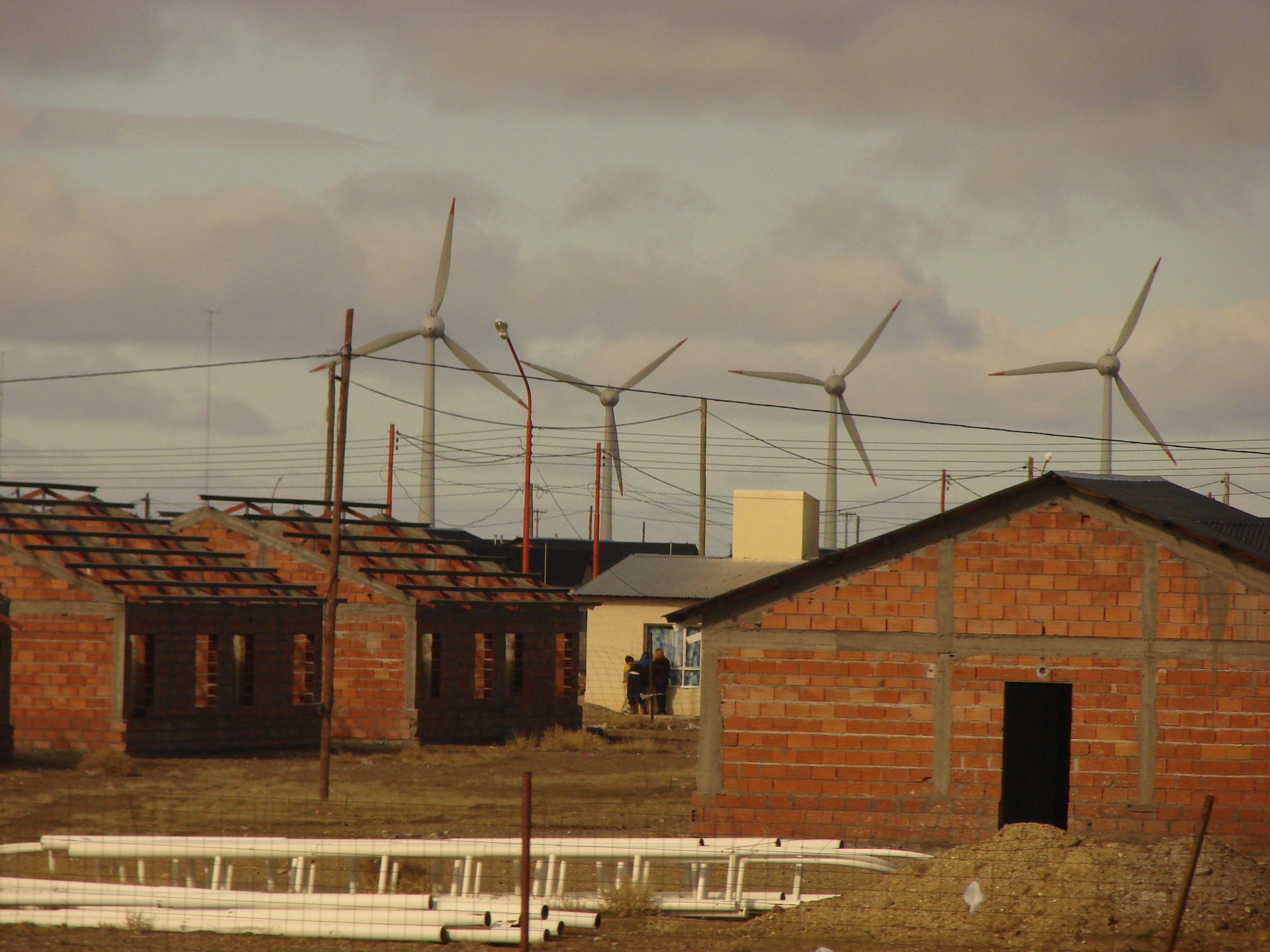 Pico Truncado, Santa Cruz Province, Argentina